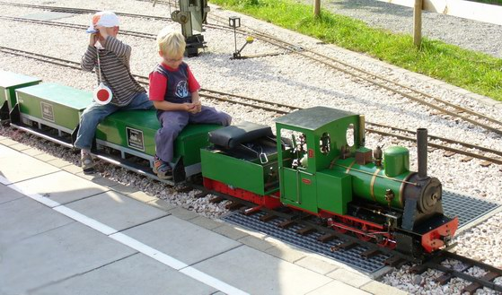 Gartenbahn, Kreisfreilichtmuseum Bad Schussenried-Kürnbach